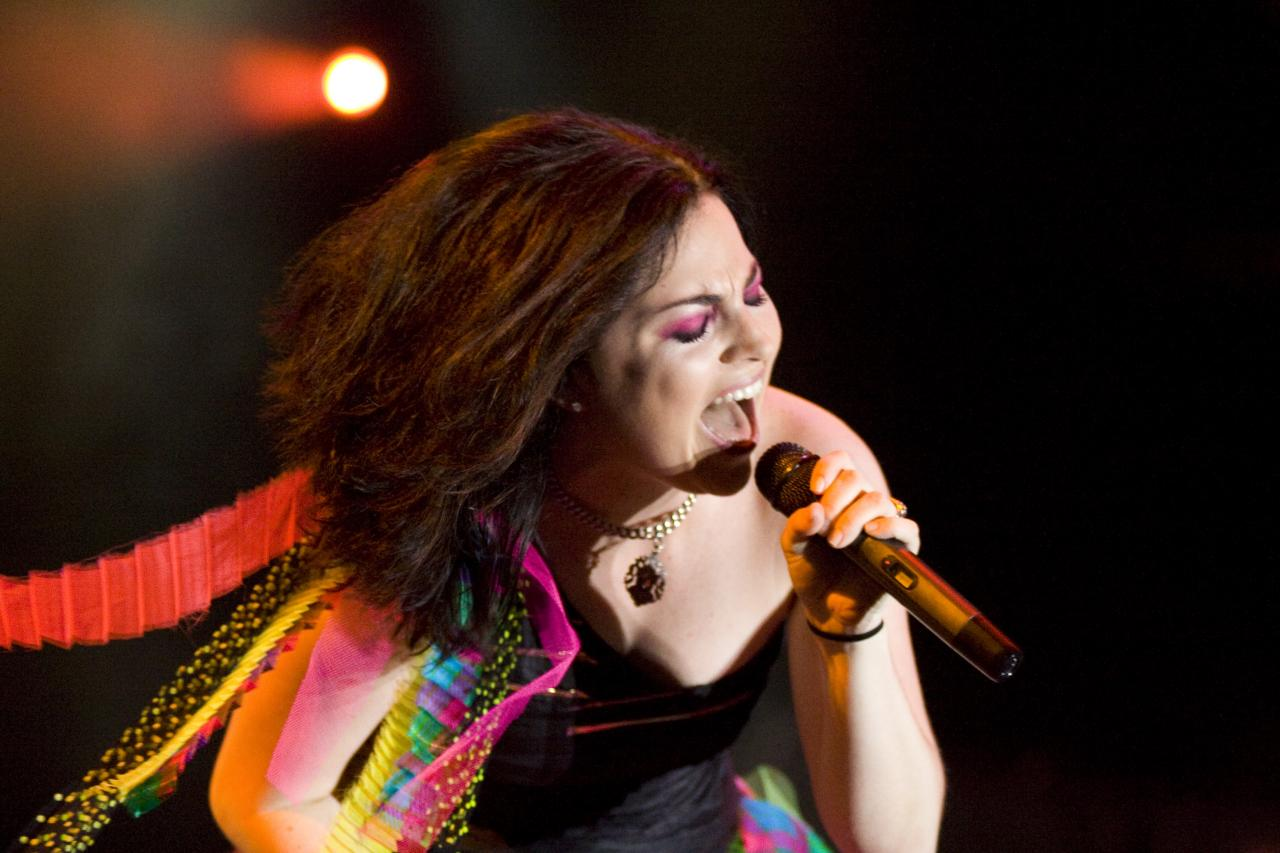 Evanescence @ Maquinaria Festival - 08/11/2009 - São Paulo, Brasil É proibida a cópia ou reprodução deste material sem a autorização do autor. Por favor, não publique nada daqui sem o devido crédito. Fotógrafo: Alexandre Cardoso